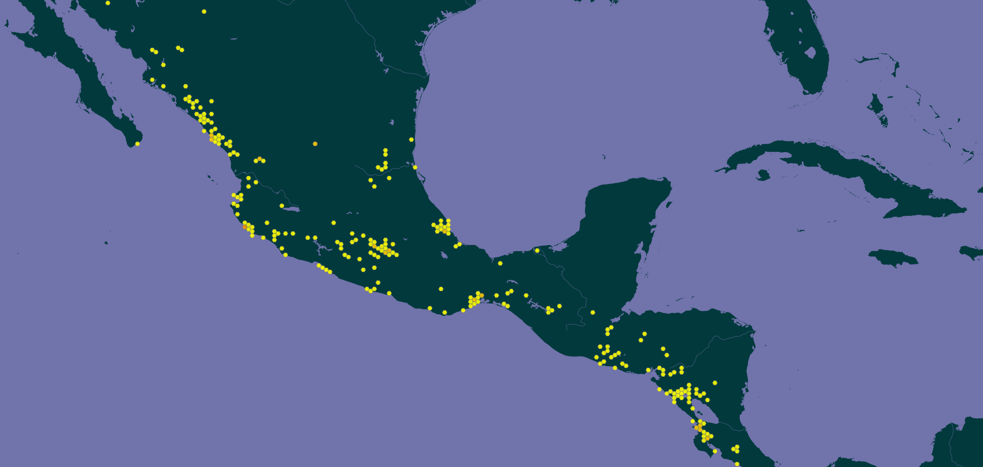 Mapa GBIF de distribuição de Crescentia alata.